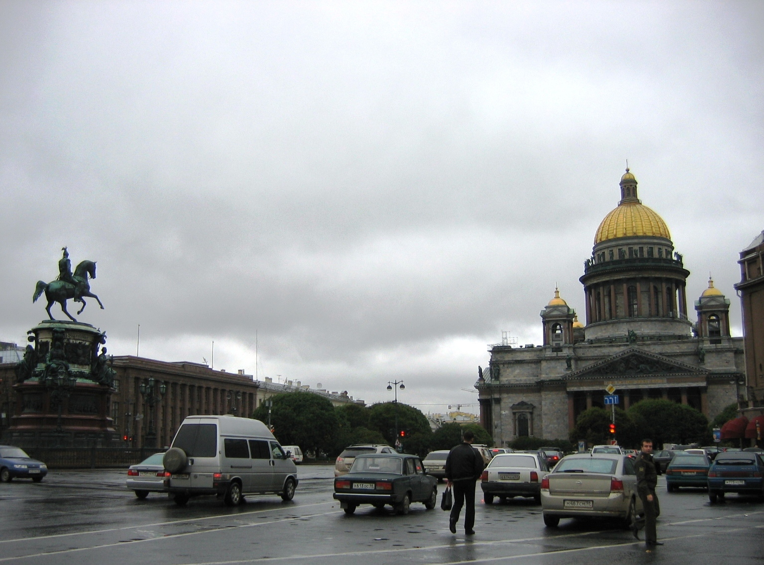 Montferrand - St Isaac